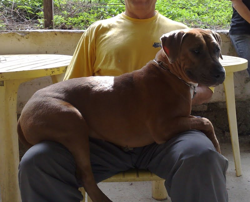 Pedro Dantas e uma Dogue Fêmea